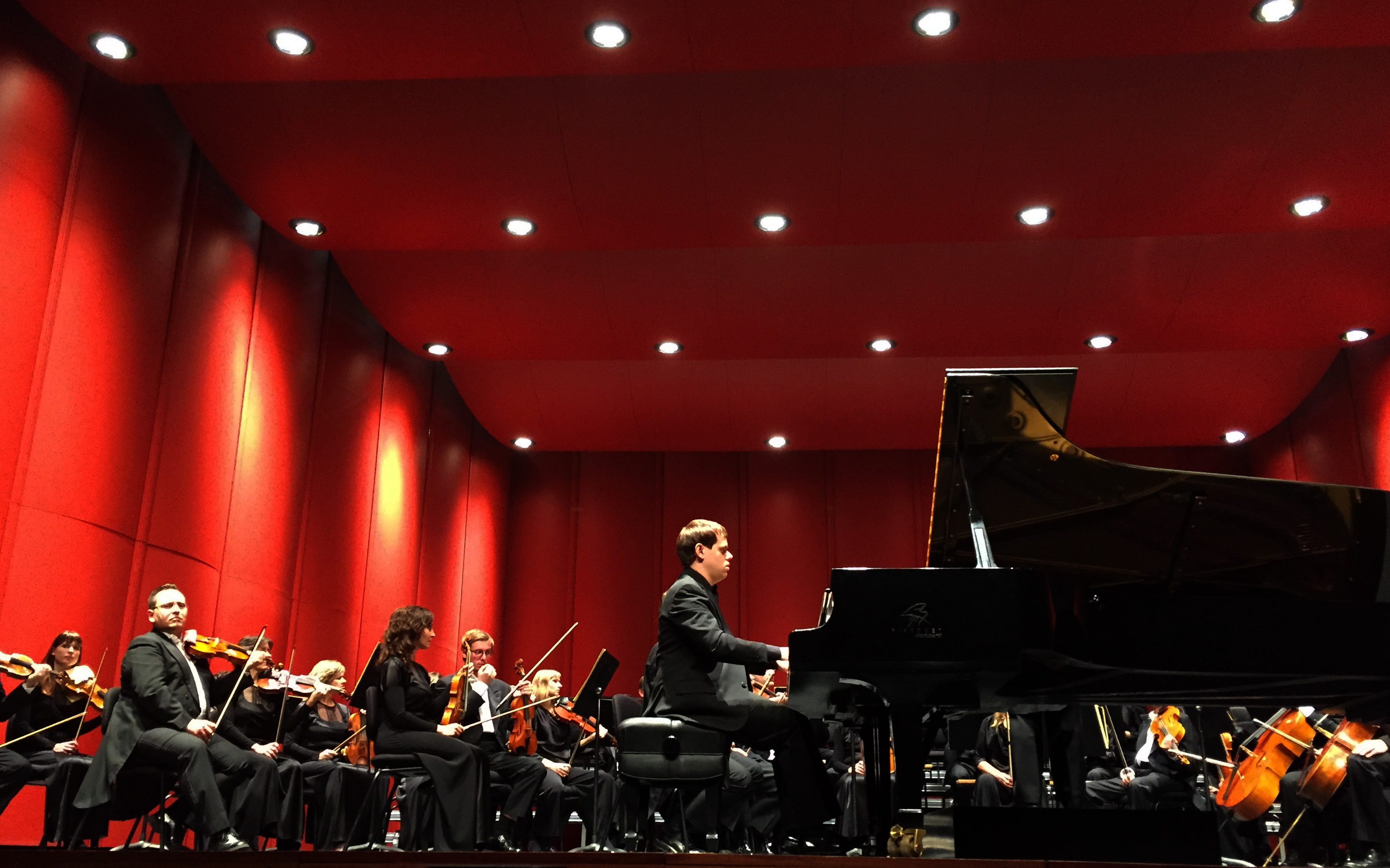 Ignasi Cambra interpretant el concert per a piano n.23 KV 488 de W.A.Mozart, acompanyat de l'orquestra simfònica del Liceu